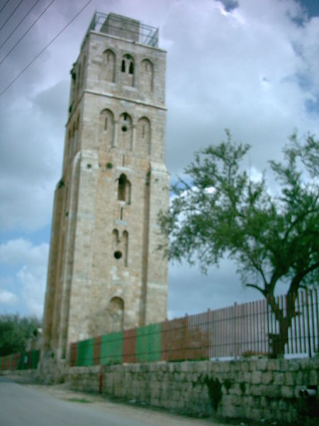 המגדל הלבן ברמלה. צולם על ידי אתמול. The White Tower in Ramla. April 3rd 2005